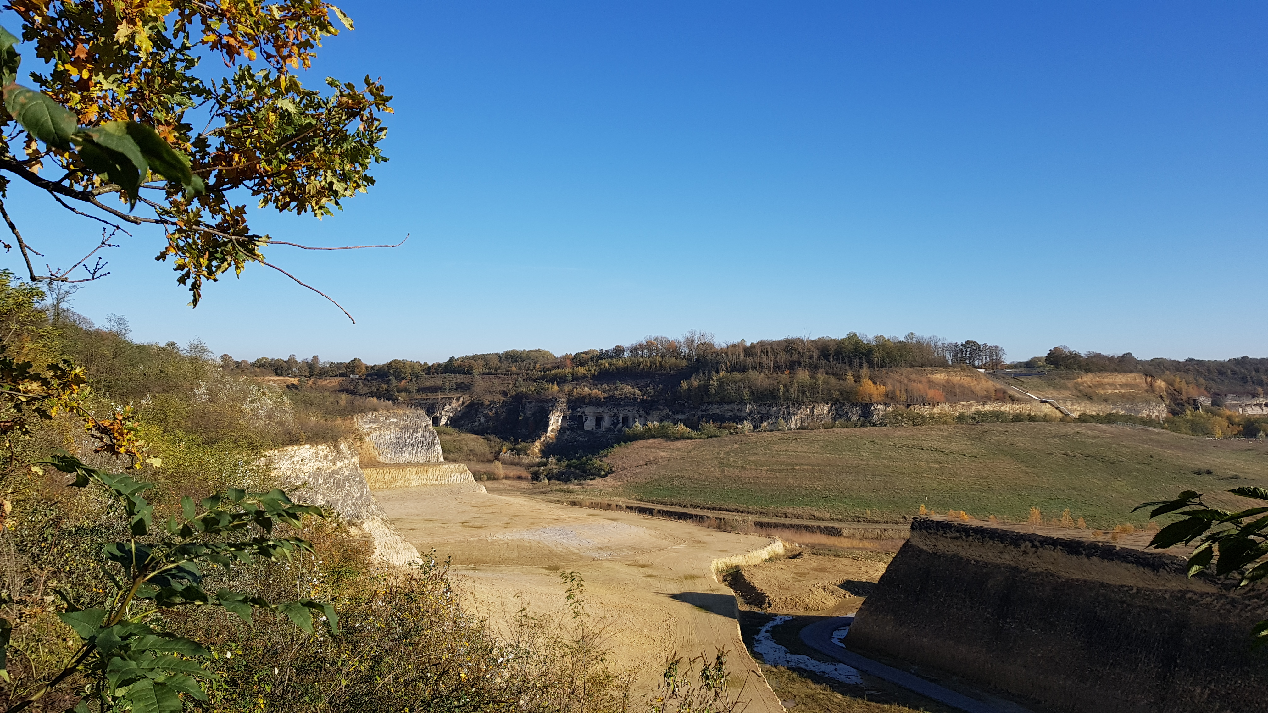 Oehoevallei op de Sint-Pietersberg, Maastricht, Nederland